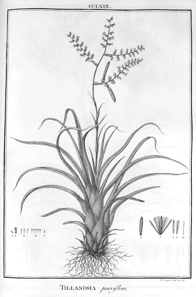 Tillandsia parviflora Ruiz & Pav.